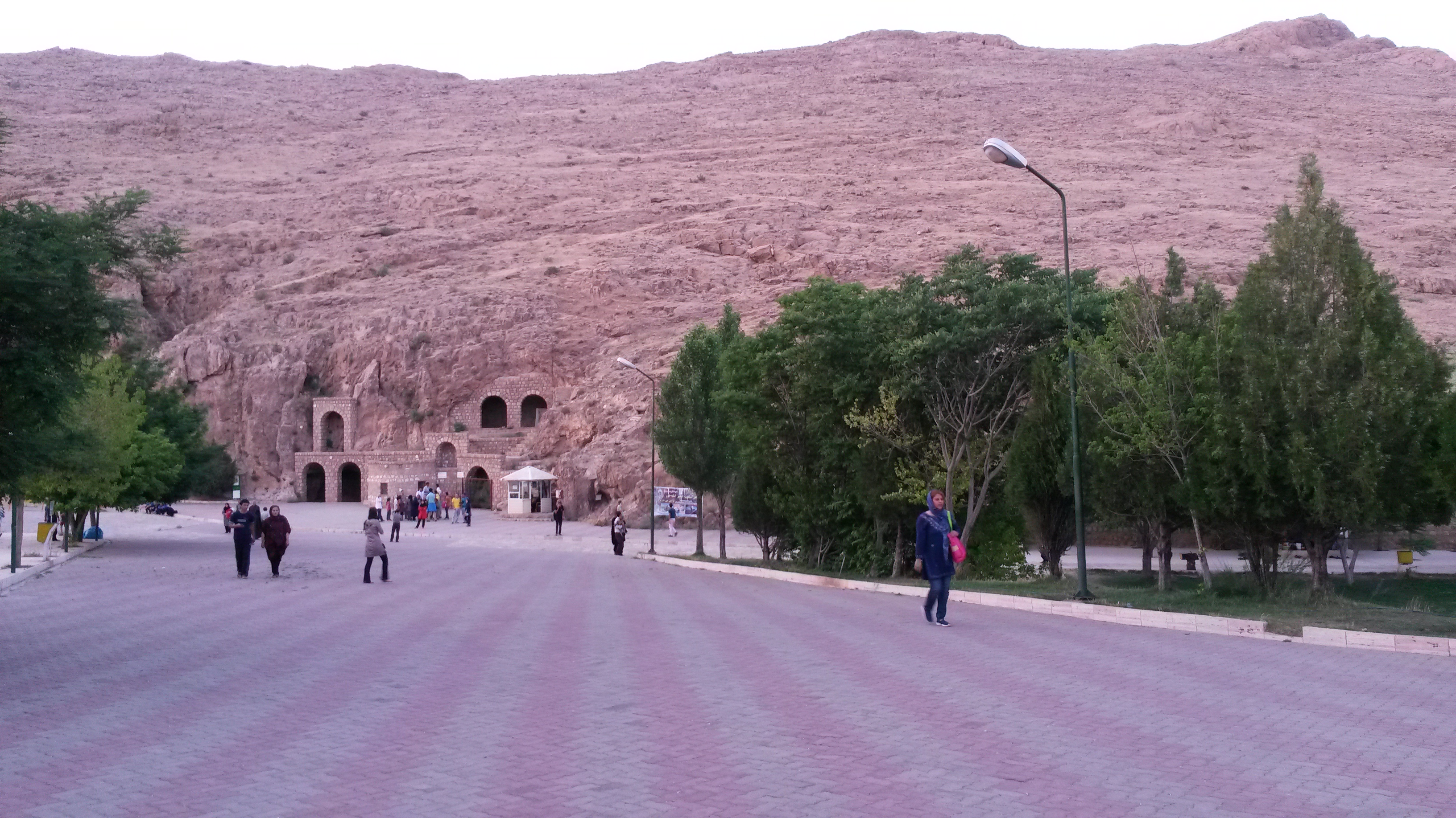 محوطه و ورودي غار